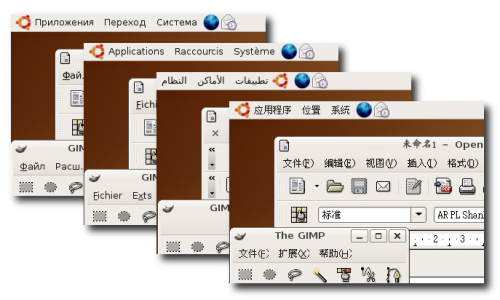 Ubuntu languages